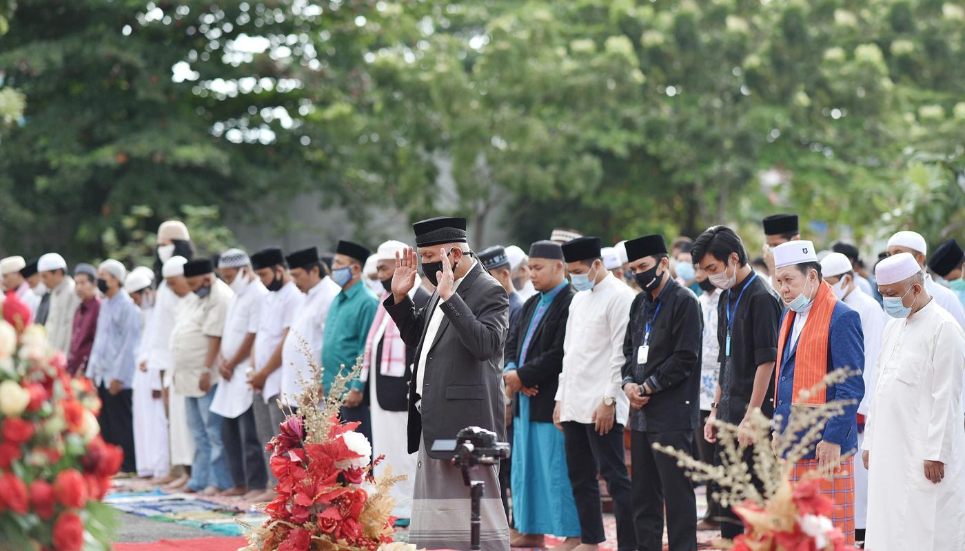 Idul Adha UPI Padang